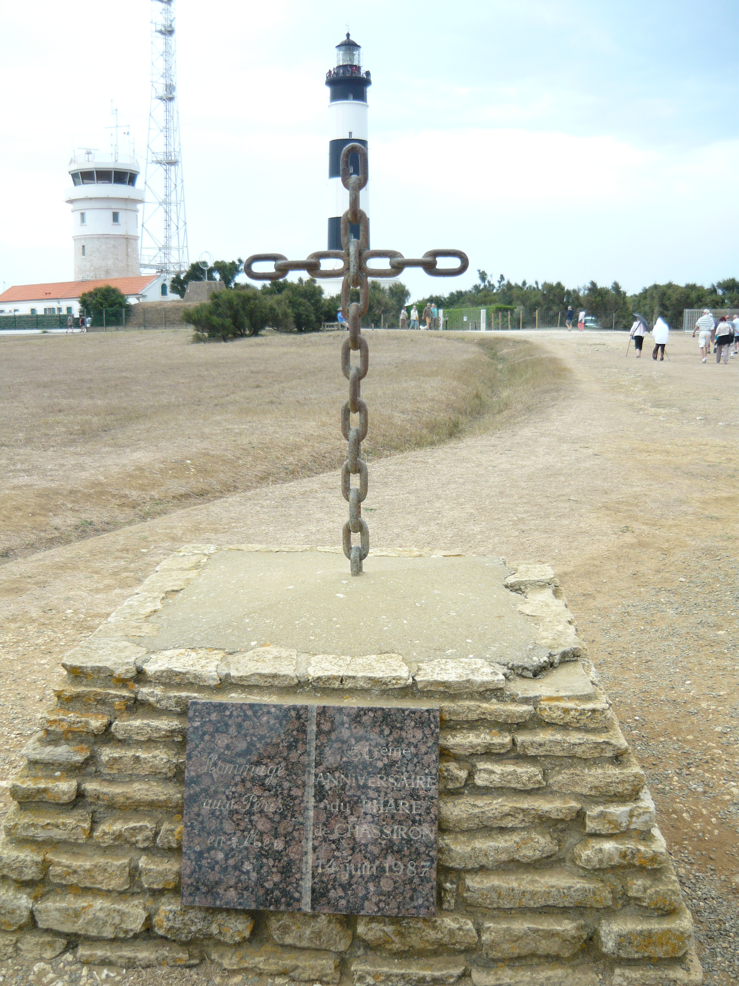 Phare de Chassiron. Stèle en hommage aux péris en mer créée lors du cent cinquantième anniversaire du phare en 1987.